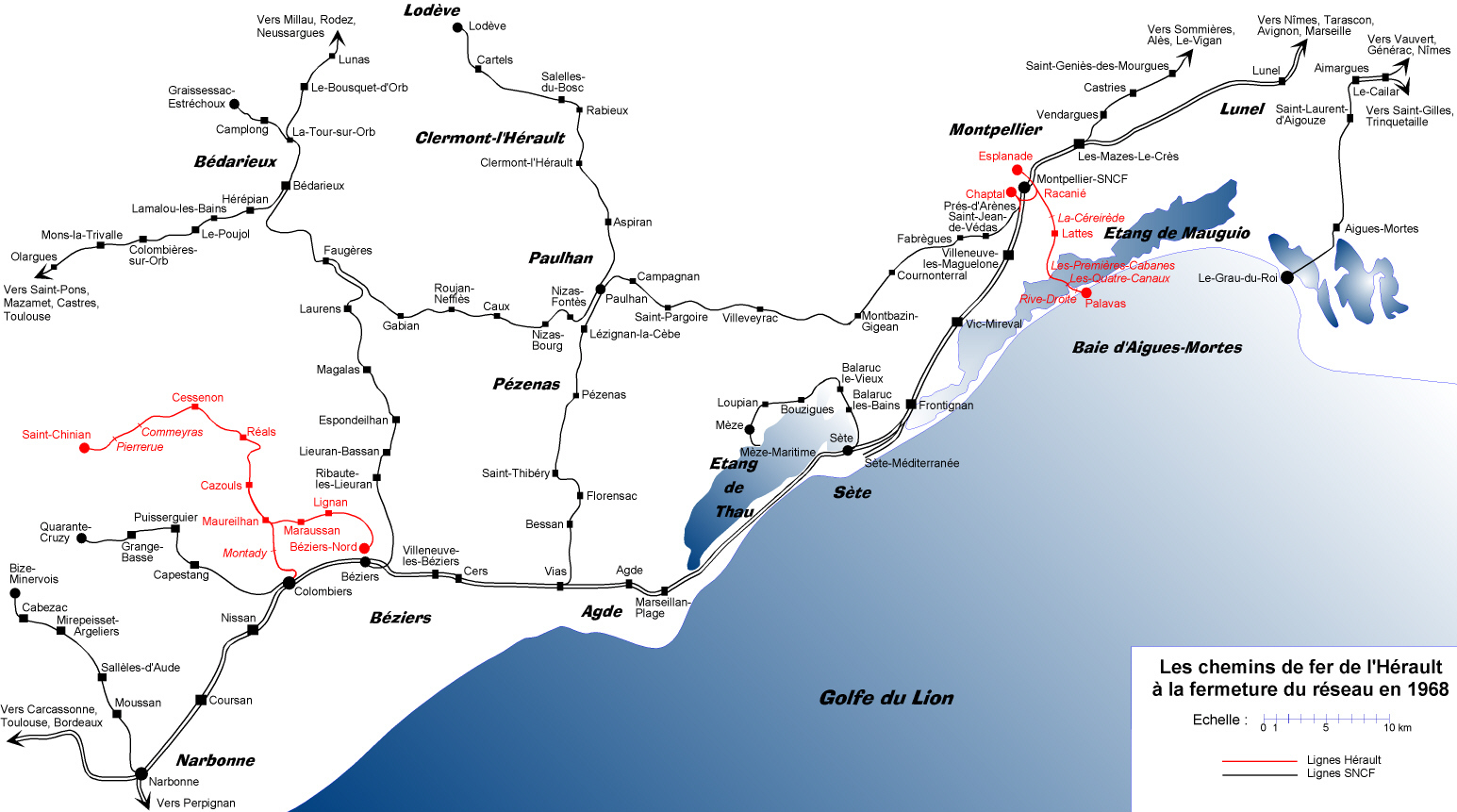 Chemins de fer de l'Hérault - Carte ferroviaire à la fermeture du réseau en 1968.